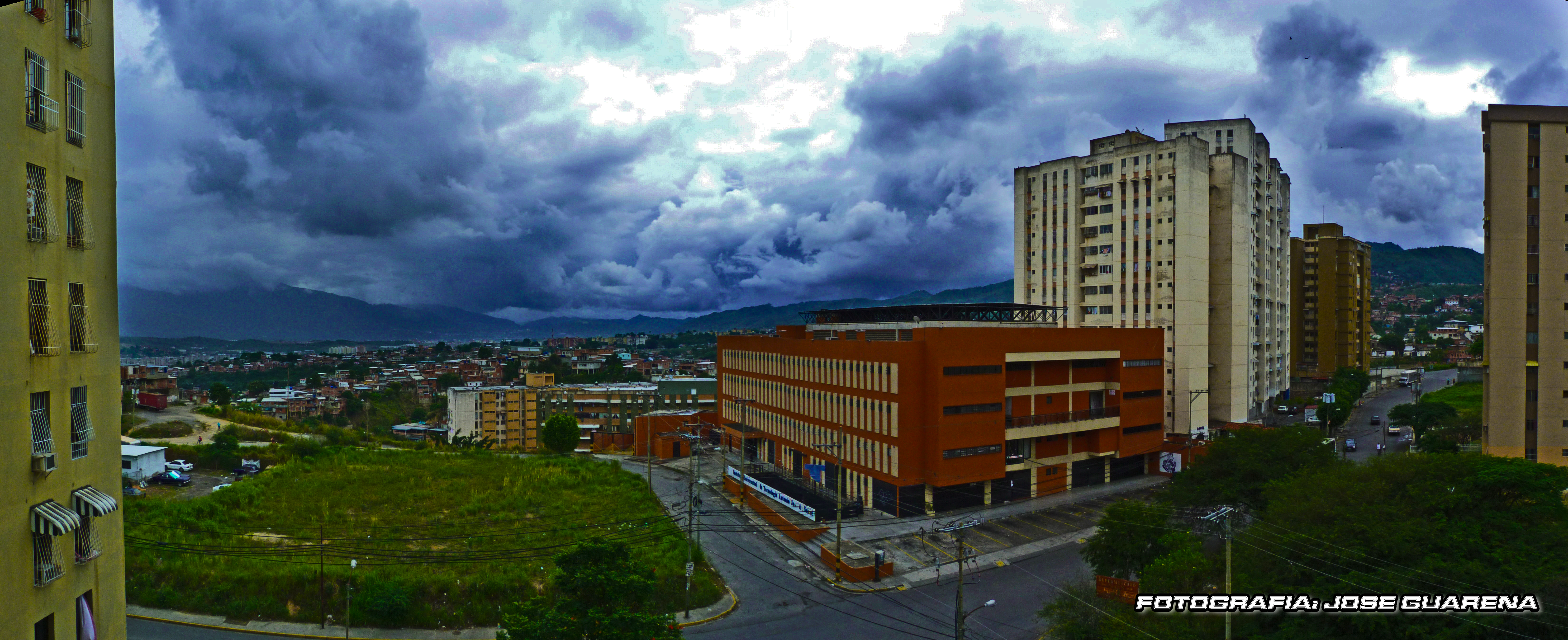 Vista panoramica de La Urb. El Calvario de Guarenas